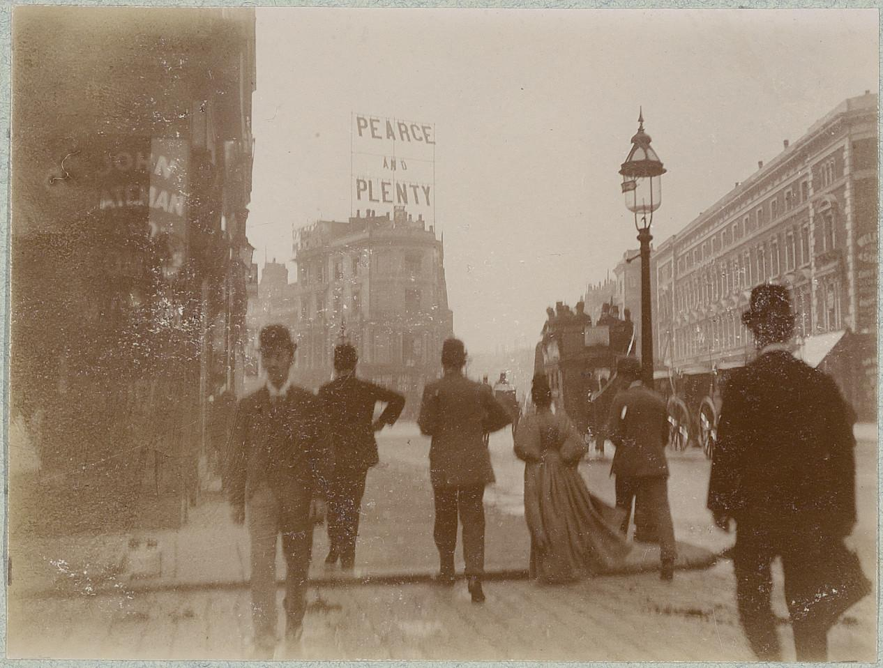 Beschrijving Oxford Street, Londen, Verenigd Koninkrijk Foto uit album met straatbeelden van Amsterdam en andere plaatsen in Noord-Holland, Londen en het Isle of Wight, samengesteld door de sigarenkoopman Willem Toussaint. In het album foto's door Toussaint, C.G. 't Hooft, H. van der Masch Spakler en Johan Boursse. Documenttype foto Vervaardiger Toussaint, Willem (1865-1929) Collectie Collectie Stadsarchief Amsterdam: albums Datering 1891 Inventarissen Afbeeldingsbestand ANWS00244000084